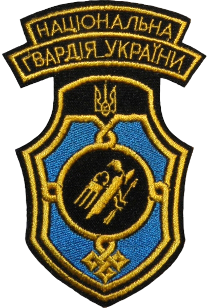 Нарукавний знак 4-ї Північної дивізії Національної гвардії України.